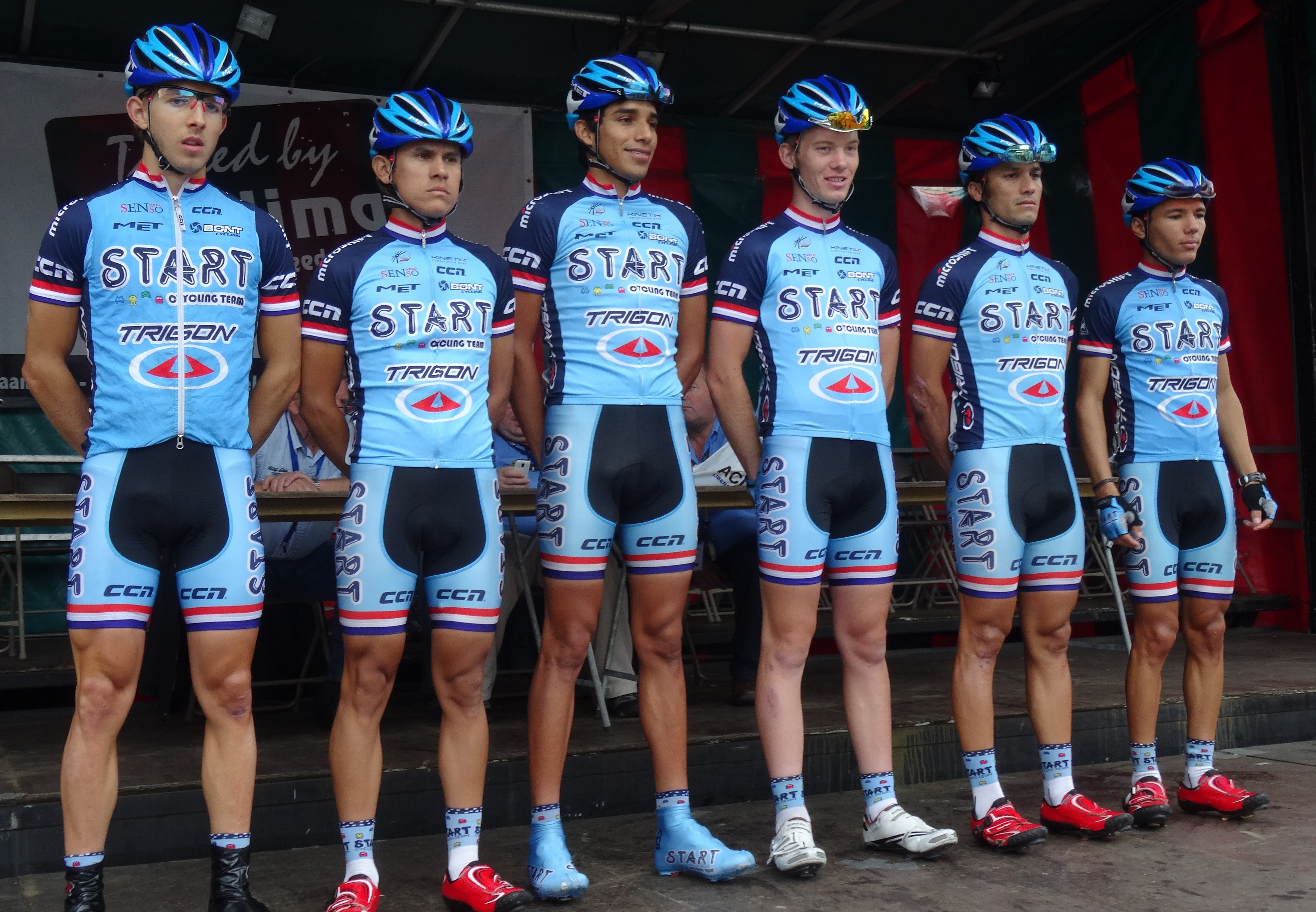 Reportage photographique réalisé le dimanche 10 août à l'occasion du départ et de l'arrivée de la Flèche du port d'Anvers 2014 à Merksem (Anvers), Belgique.